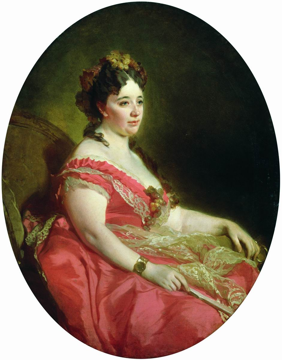 "Портрет Губониной"